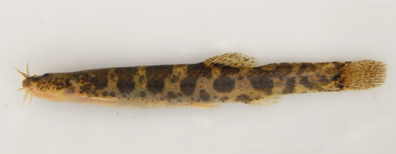 Scleronema minutum - Quebrada de los Cuervos, Dpto. de Treinta y Tres, Uruguay - 3/III/2015